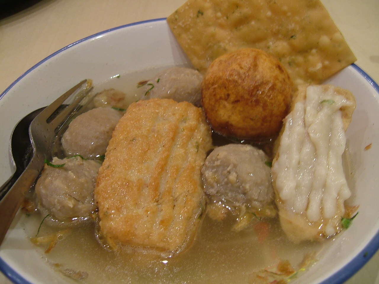 Deep-fried fish/meatballs and tofu with soup. バタゴルクアッ Batagor (Bakso Tahu Goreng) Kuah 豆腐の上に魚のすり身を載せて蒸した物を鶏がらスープで煮込んだ物。この写真では牛肉のBakso(バッソ)とPangsit(パンシッ)も入れている。